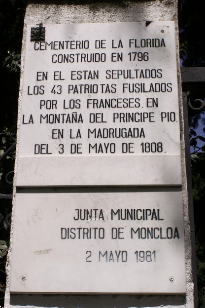 Cementerio de La Florida. Placa en recuerdo de los fusilados. Construido en 1796, en él están sepultados los 43 patriotas fusilados por los franceses la madrugada del 5 de mayo de 1808. Se encuentra al lado de la actual escuela de cerámica en la calle de Francisco y Jacinto Alcántara, en los límites del Parque del Oeste.